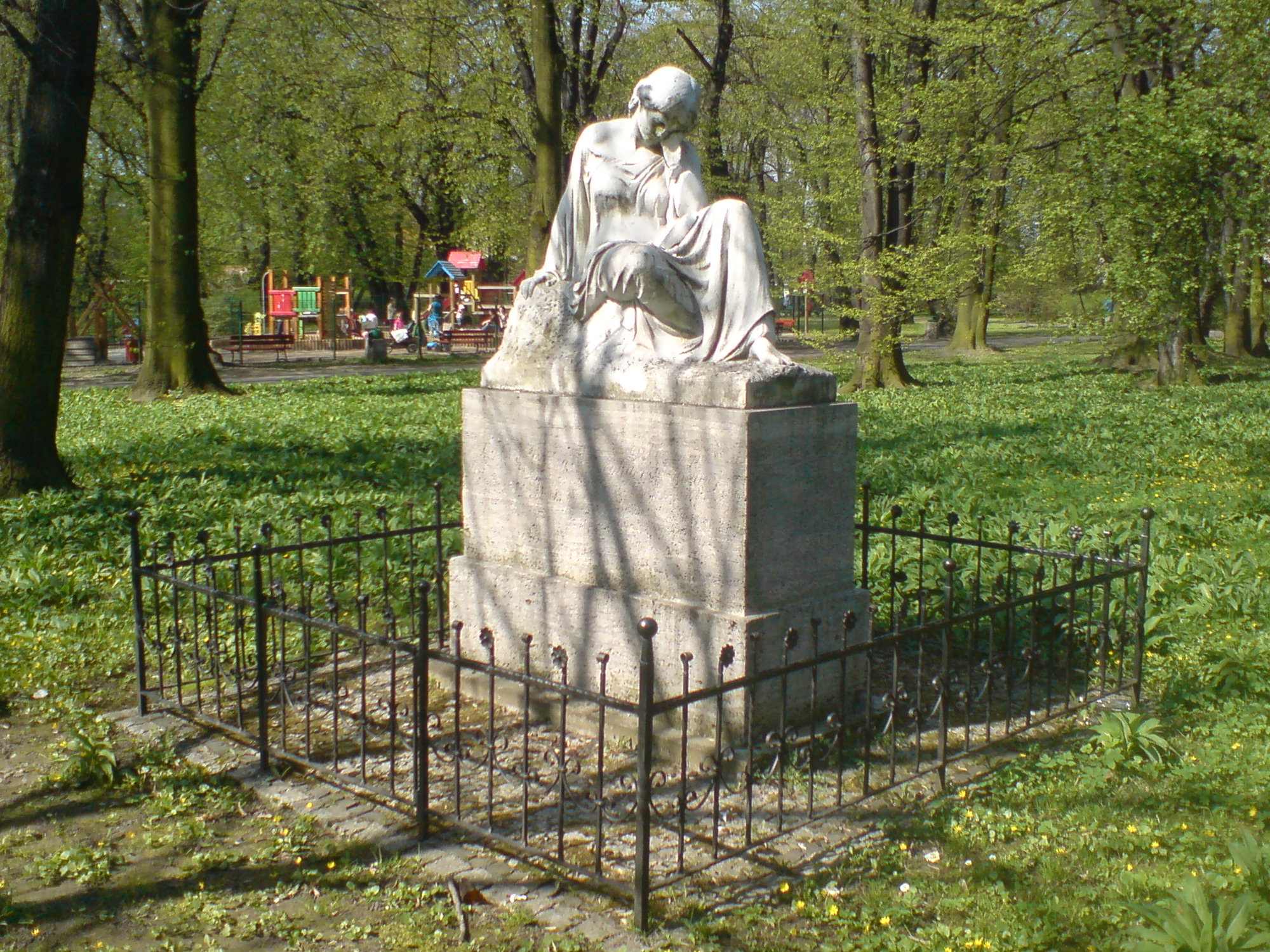 Rzeźba nagrobna Ludwika Reinersa w park im. Miasta Roth w Raciborzu